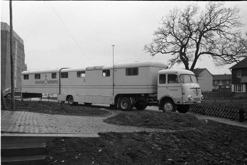 Kirchenbus „Kirche unterwegs“ vor dem Blockheizwerk im Tilsiter Weg in Altenholz-Stift bei Kiel.